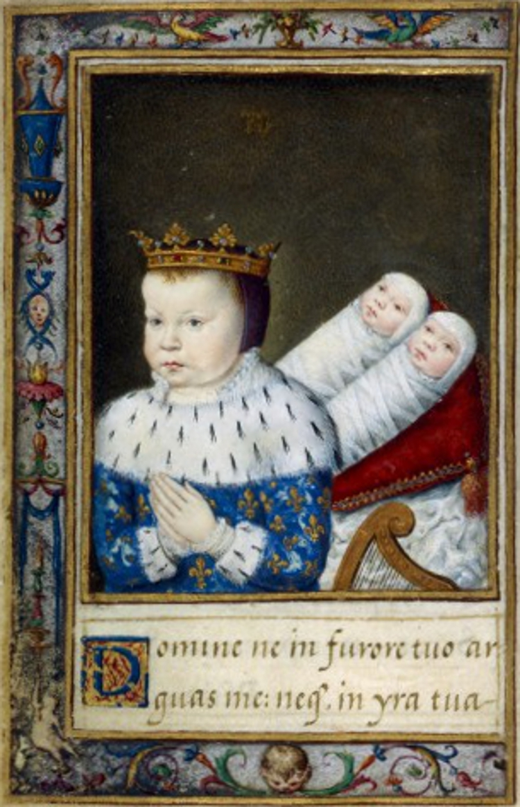 Le prince Louis et ses deux soeurs Jeanne et Victoire dans le livre d'heures de Catherine de Médicis, BnF Louis de France est le deuxième fils de Henri II et de Catherine de Médicis. Né en février 1549, il meurt prématurément en octobre 1550. S'il existait des portraits originaux du jeune prince, aucun semble nous être parvenu (voir Les Clouet de Catherine de Médicis par Zvereva). La seule image qui reste de lui serait une miniature du livre d'heures de Catherine de Médicis. La base de données de la BnF nous indique que le petit garçon aux mains jointes représente le futur Charles IX, mais on peut supposer qu'il s'agit plutôt du prince Louis. Catherine de Médicis a voulu avoir dans son livre d'heures, le portrait de tous ses enfants, or Charles IX est déjà représenté sur un autre folio. De plus, le jeune prince est ici représenté avec deux autres enfants de la reine morts en bas âge. L'artiste qui a peint le livre d'heures vers 1573 aurait donc regroupé sur une seule page les enfants de la reine morts prématurément